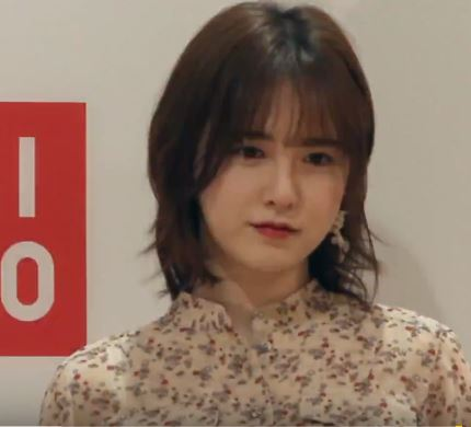 31일 오후 서울시 중구 유니클로 명동중앙점에서 '유니클로 리조트 웨어 18 S/S 컬렉션이 열려 로이킴, 구혜선, 안소희, 장윤주, 안재현이 참석했다.